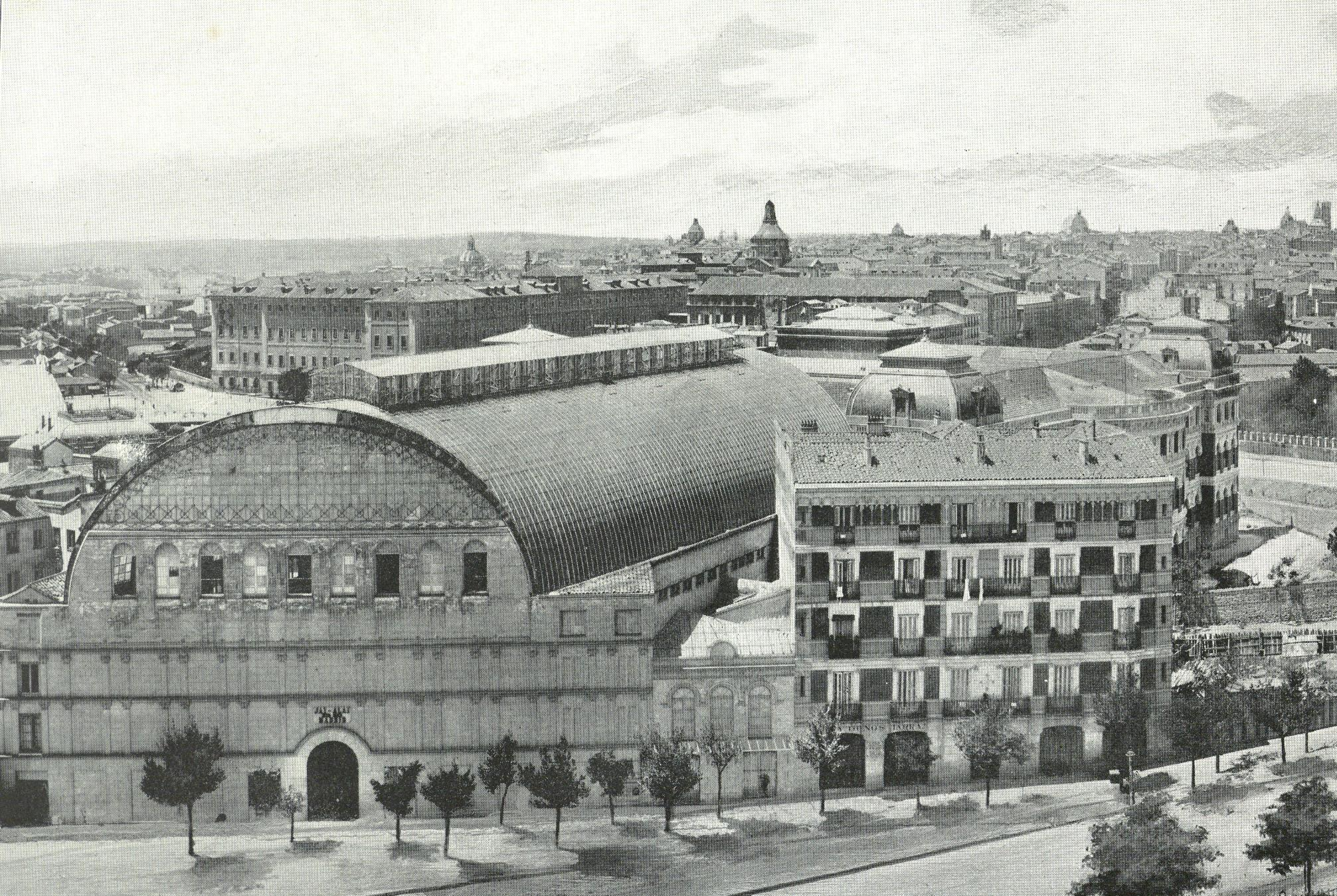 Vista panorámica de Madrid.